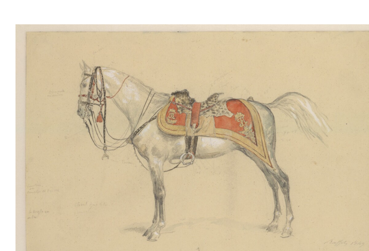 Šiml Leopolda Kolowrat-Krakowského